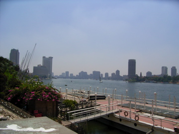 selbst fotografiert, August 2006